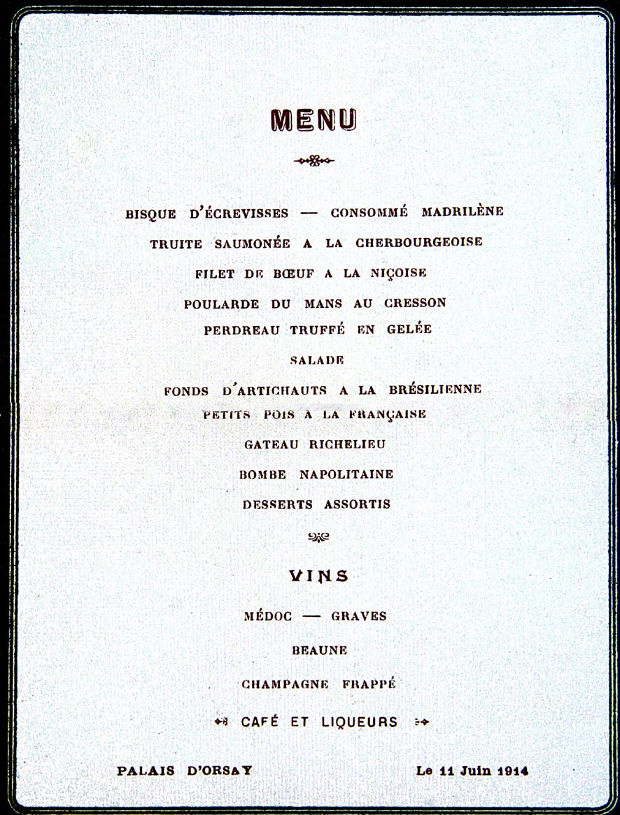 menu archives Curnonsky - editions Curnonska, T2 2007